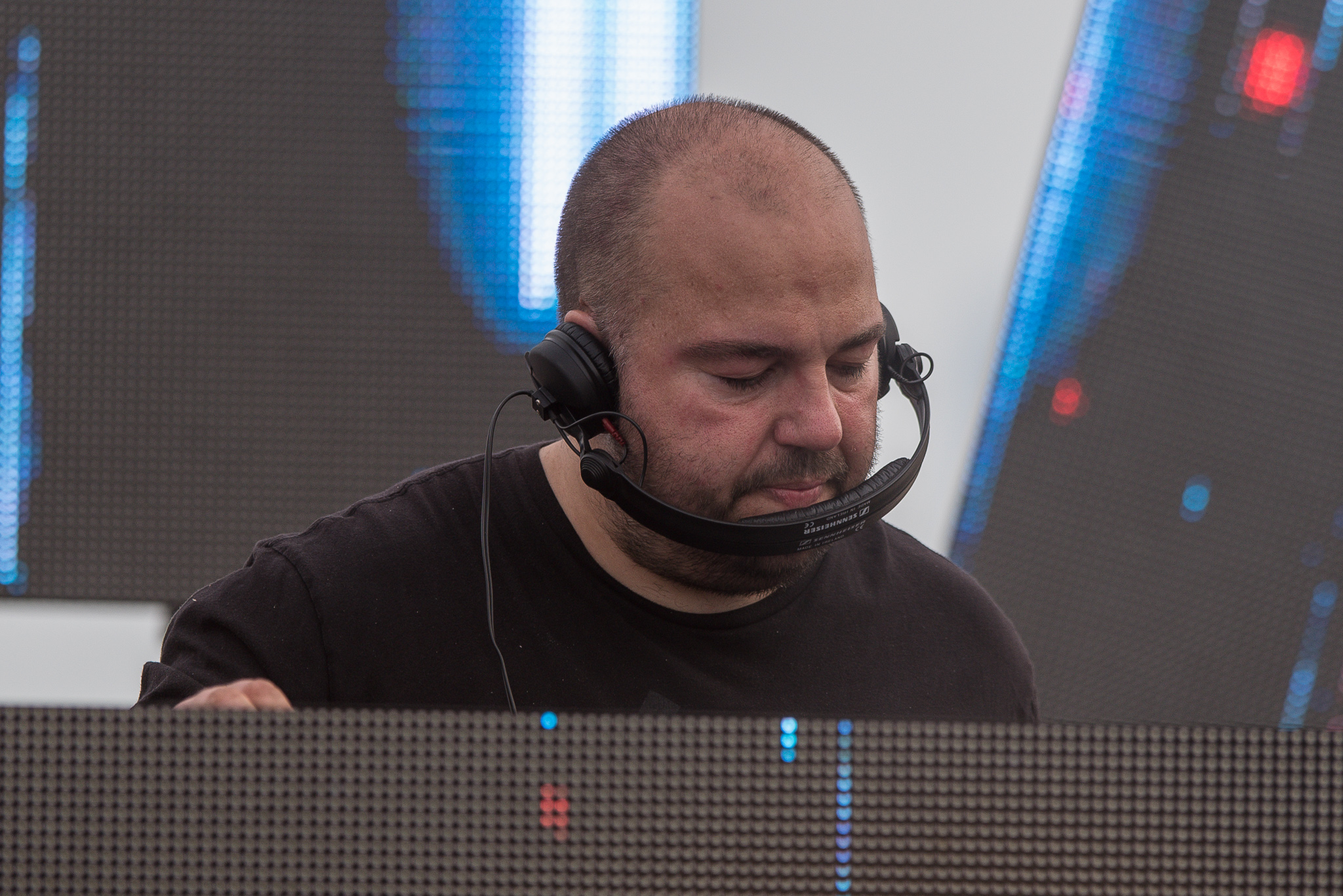 3rd Stage,Festival,Konzert,Livekonzert,Livemusik,Musik,Open Beatz 2016,Pegboard Nerds